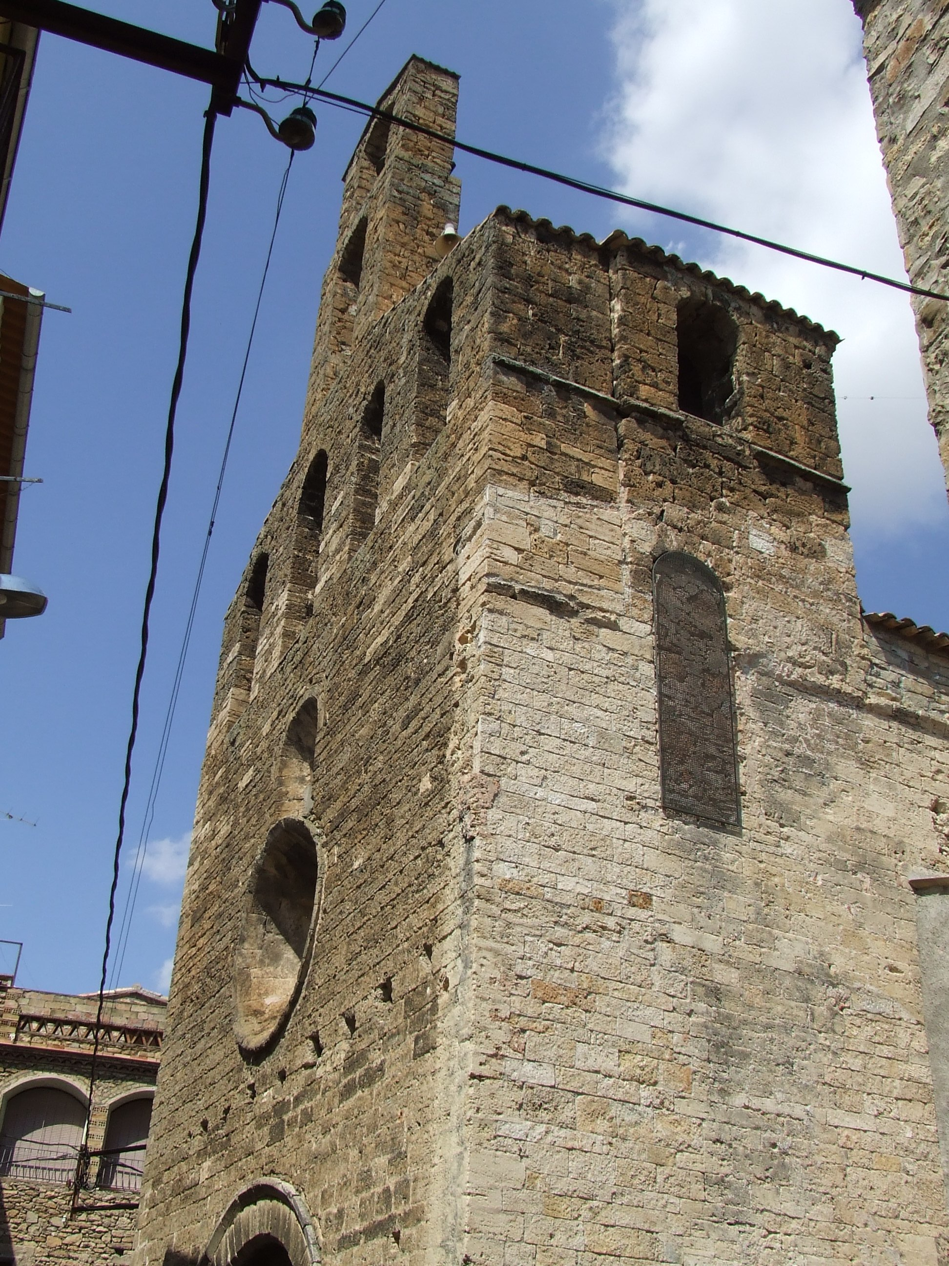 Espadanya de l'església parroquial de Santa Maria de Figuerola d'Orcau.